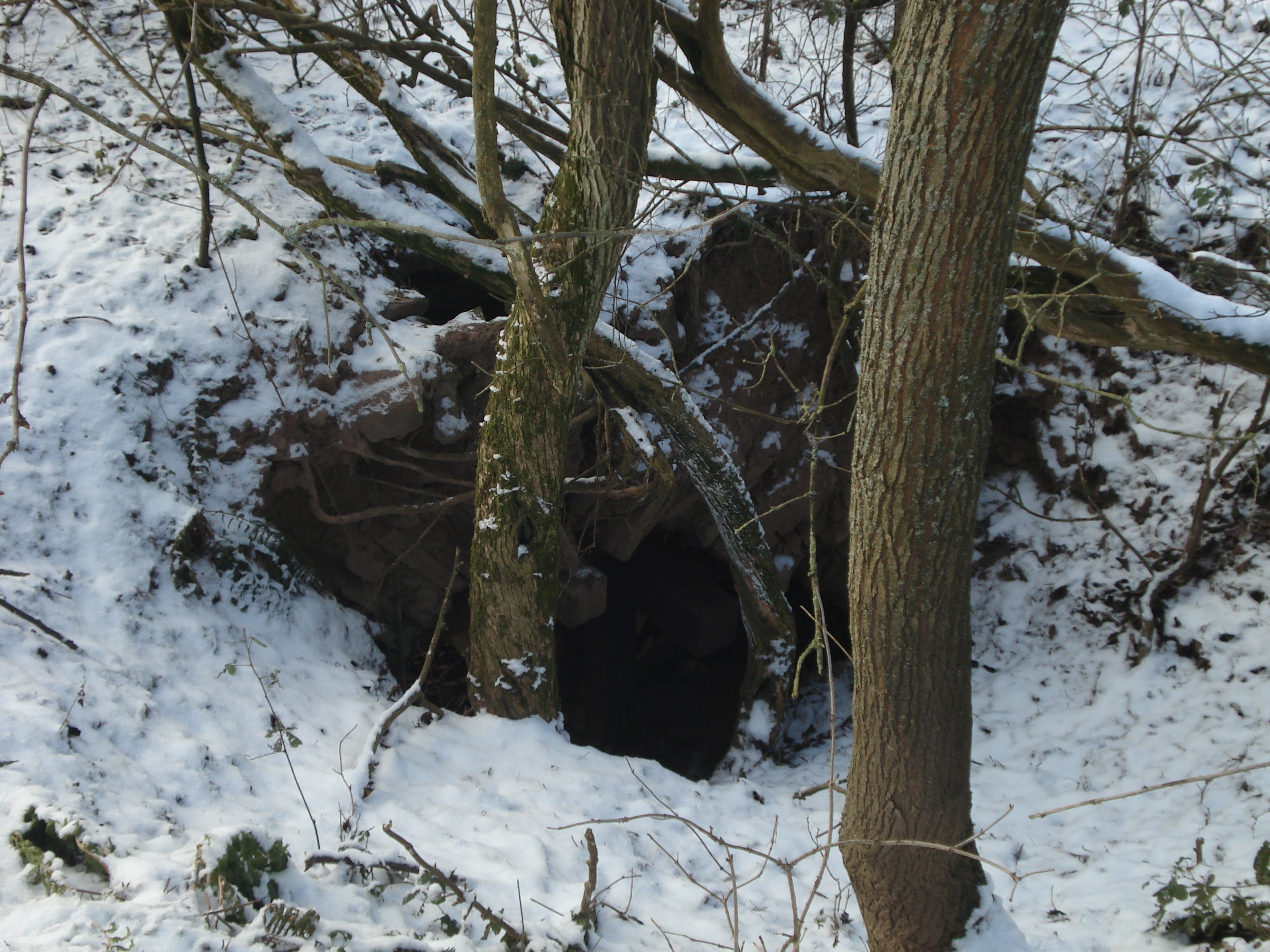 Das zerfallene Kellergewölbe des Hüttenberger Hofes bei Mömbris